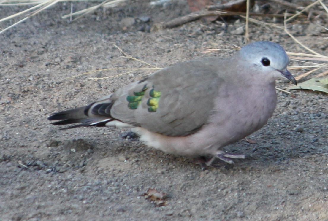 Emerald-spotted Wood Dove at Kruger Park, RSA